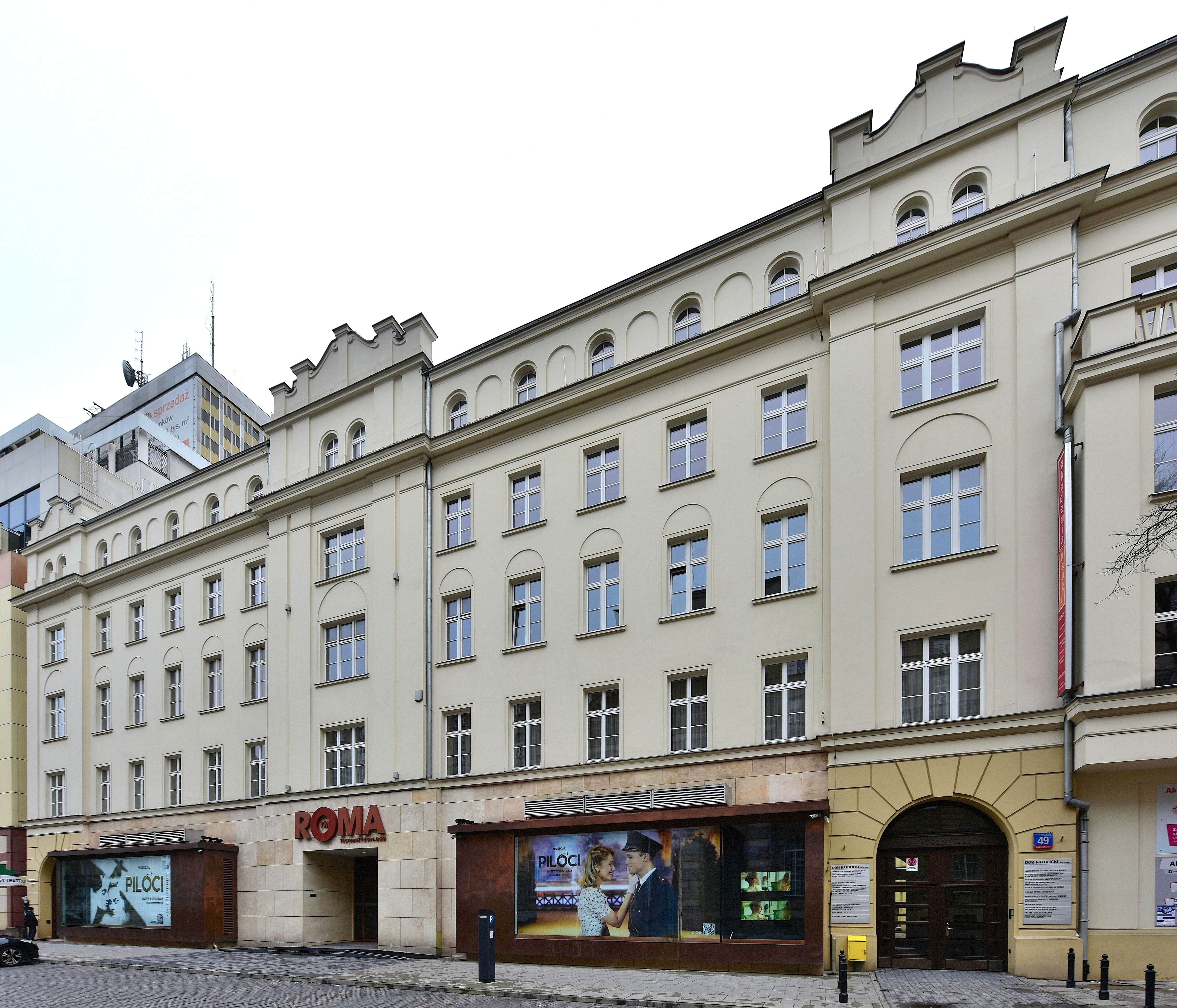 Budynek Teatr Roma w Warszawie